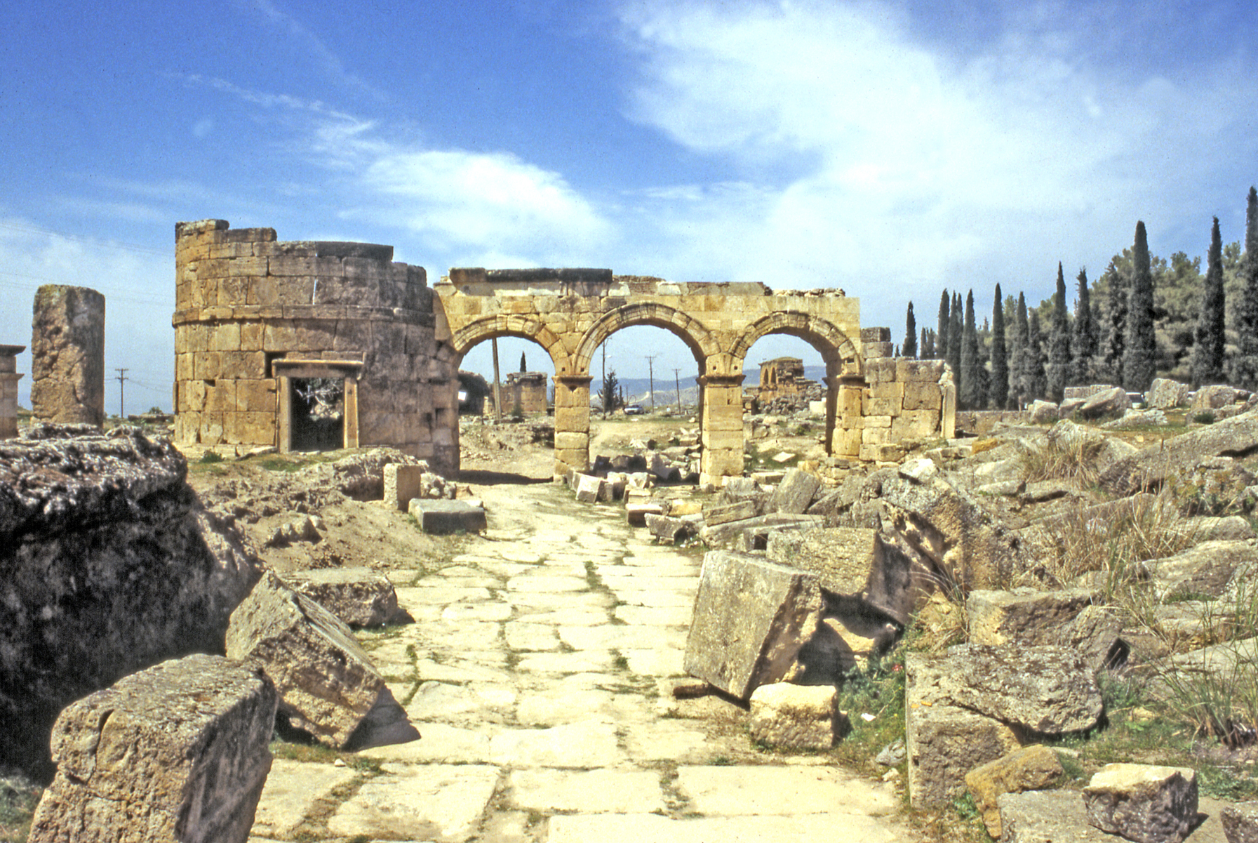 Turchia, Hierapolis di Frigia, Porta di Domiziano, lato interno